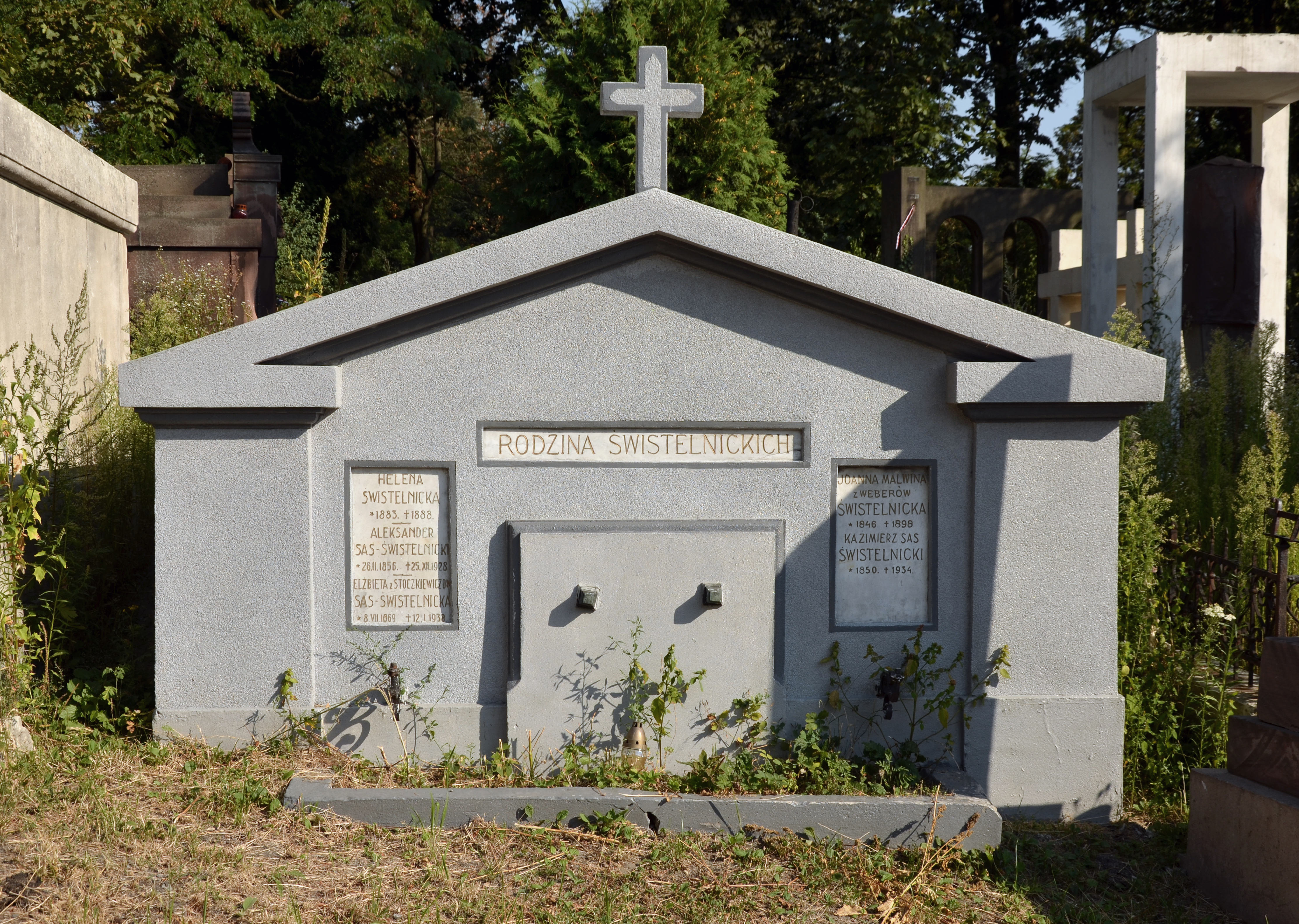 Гробівець Свістельницьких на Янівському цвинтарі у Львові.